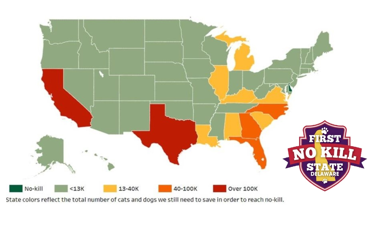 Делавер стал первым штатом на территории США, в котором запретили усыпление животных.